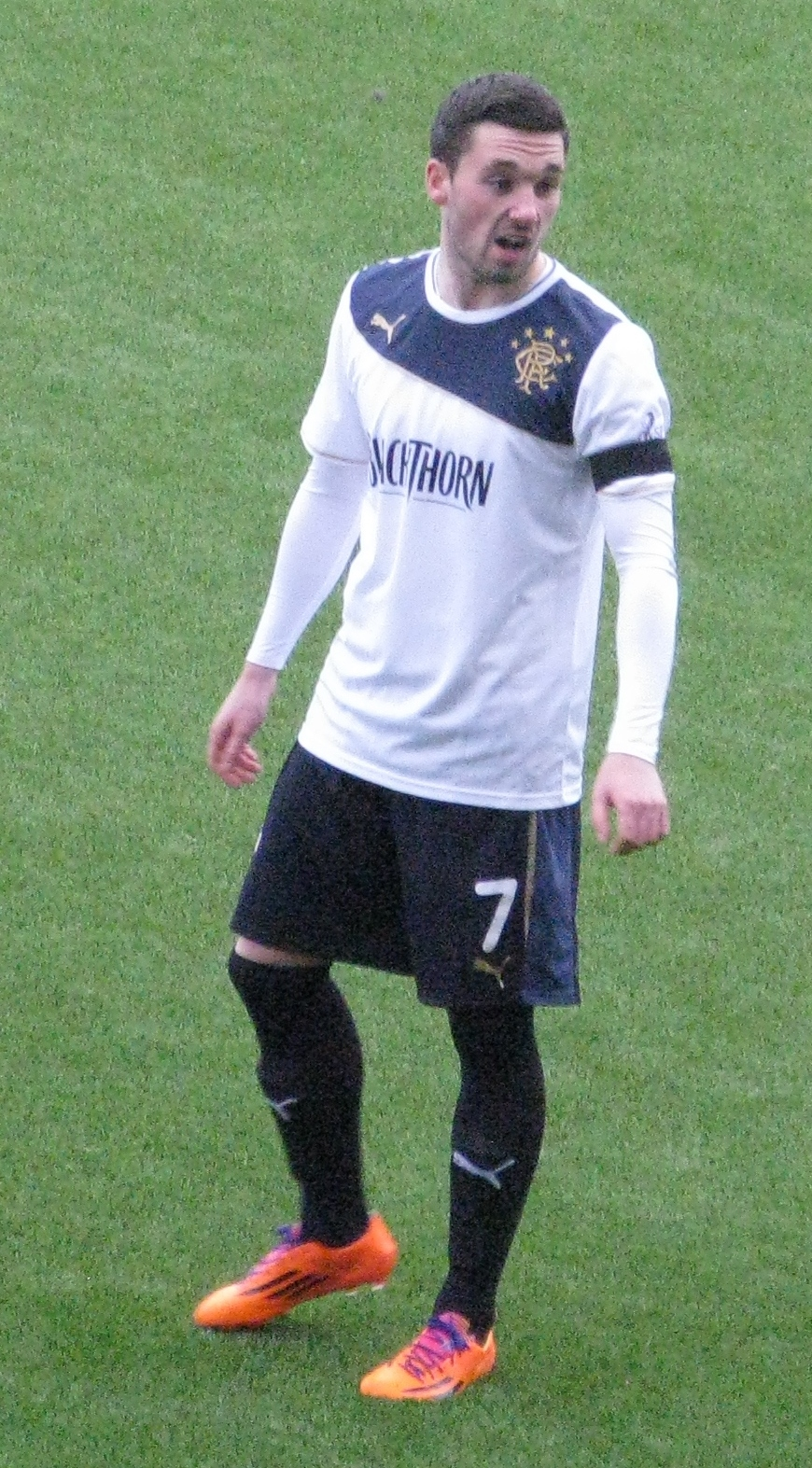 Nicky Clark (Rangers).